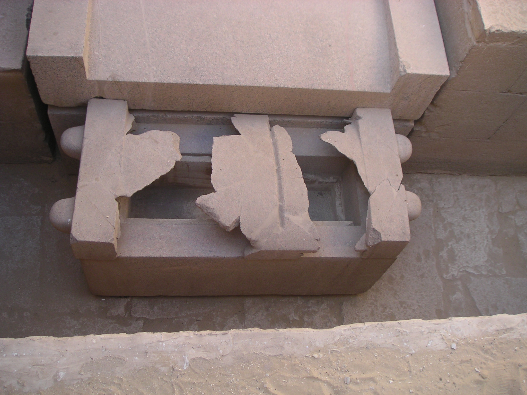 Vue du sarcophage de la princesse Khâmernebti, épouse du vizir Ptahchepsès - Abousir - novembre 2004